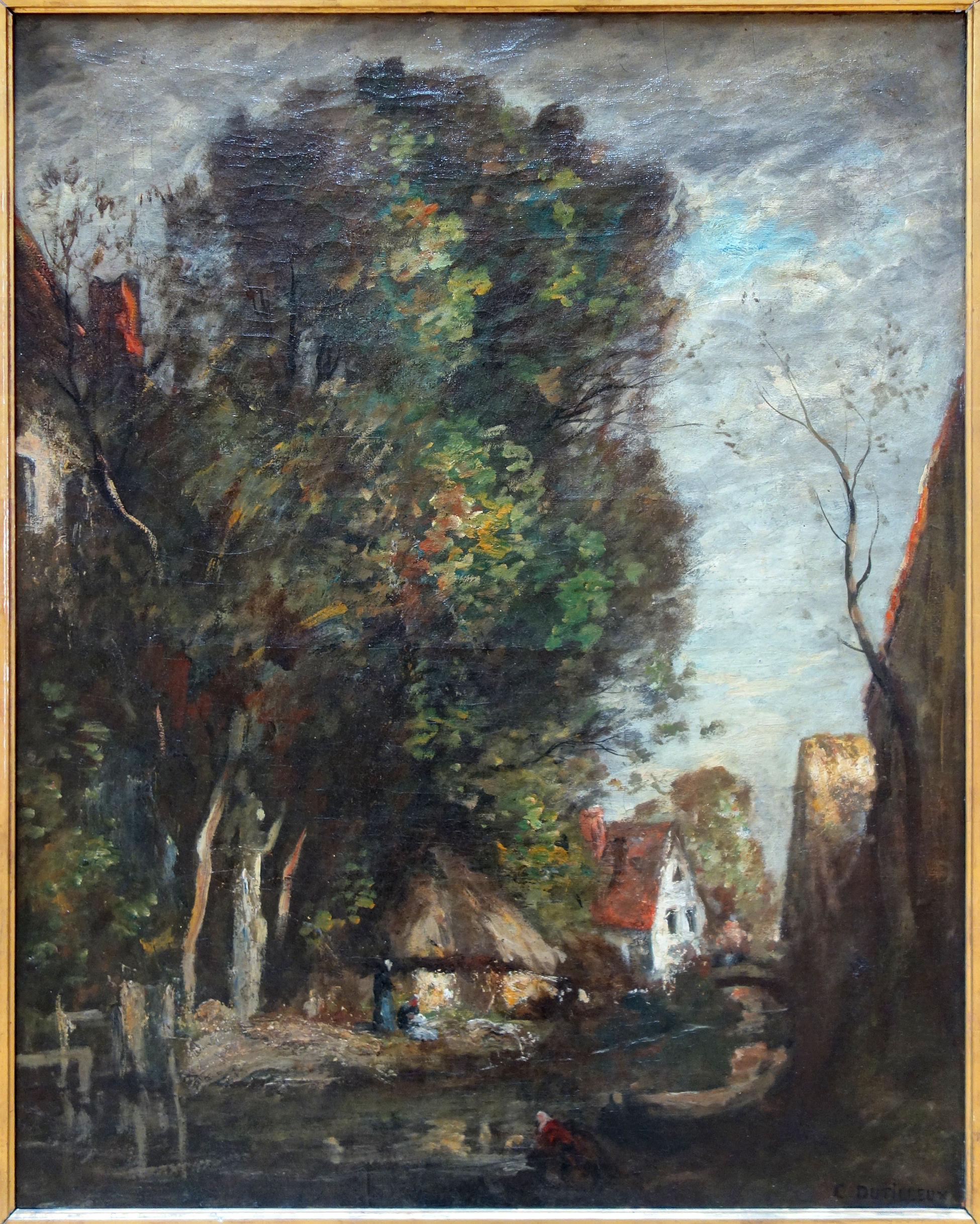 Paysage. Souvenir de Hollande au Palais des beaux-arts de Lille.